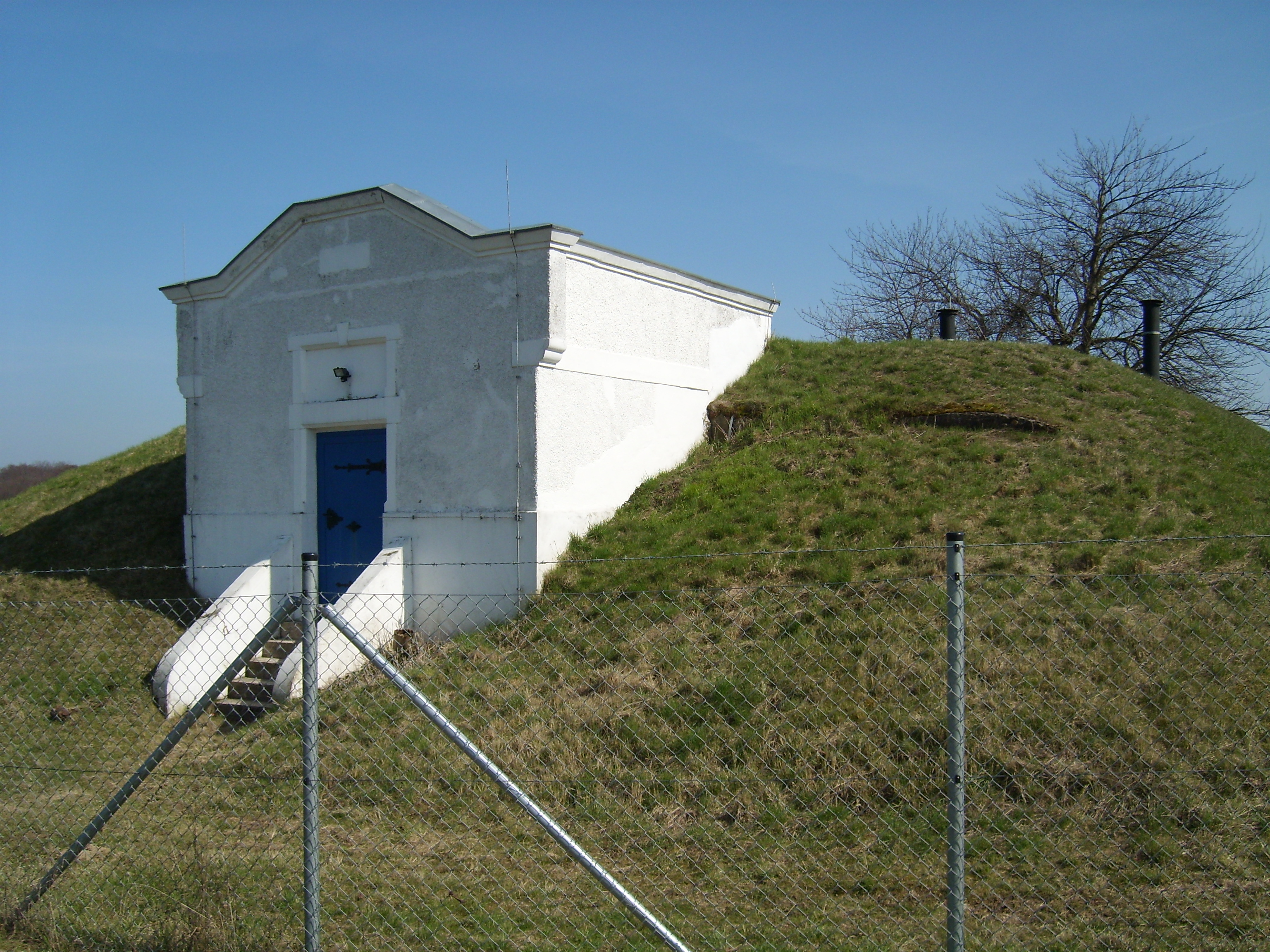 alter Hochbehälter der Stadtwerke Greifswald in Diedrichshagen